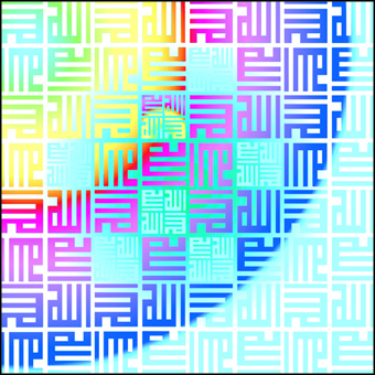 عادل عبد الرحمن،لفظ الجلالة،جواش على ورق،100سمX100سم،2002،مصرح بالاستغلال لكافة الغراض ، الصورة من إنتاجى